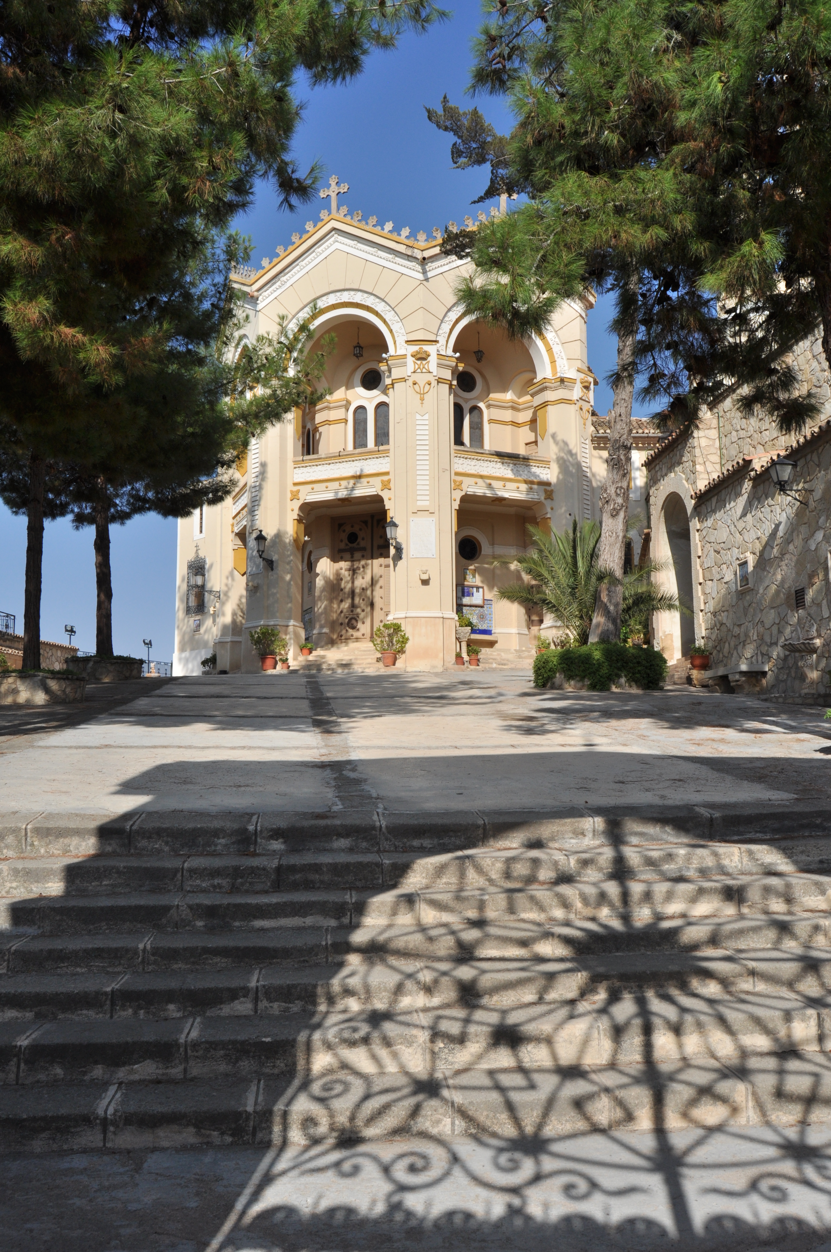 Hellin - 012